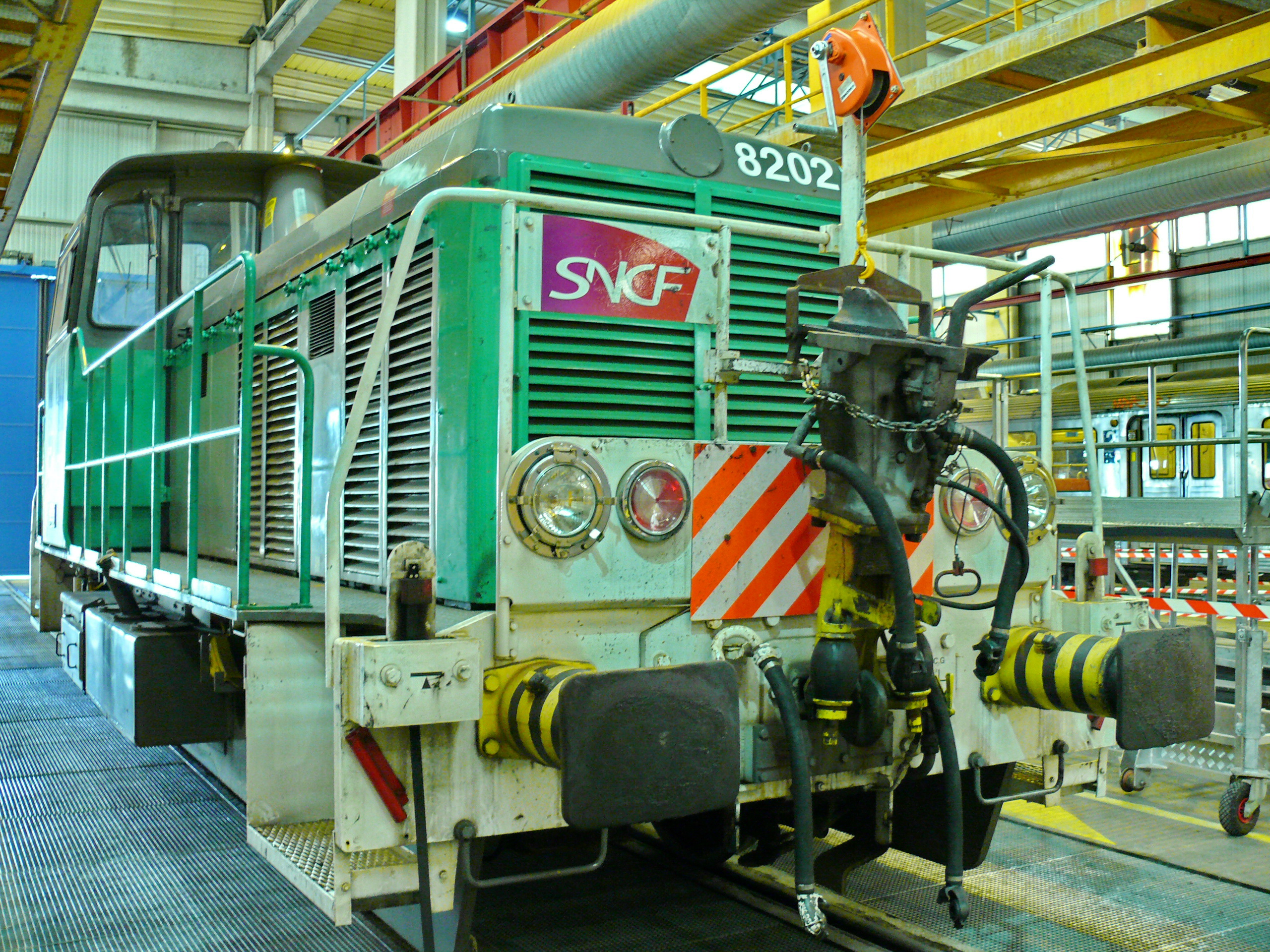 Locotracteur Y 8202 (série Y 8000) au technicentre Paris Nord-Joncherolles à Villetaneuse|Villetaneuse, Seine-Saint-Denis, France. Noter le double atelage : attelage traditionnel à choquelles et attelage automatique (replié en position verticale) pour tracter des rames de banlieue qui en sont équipées